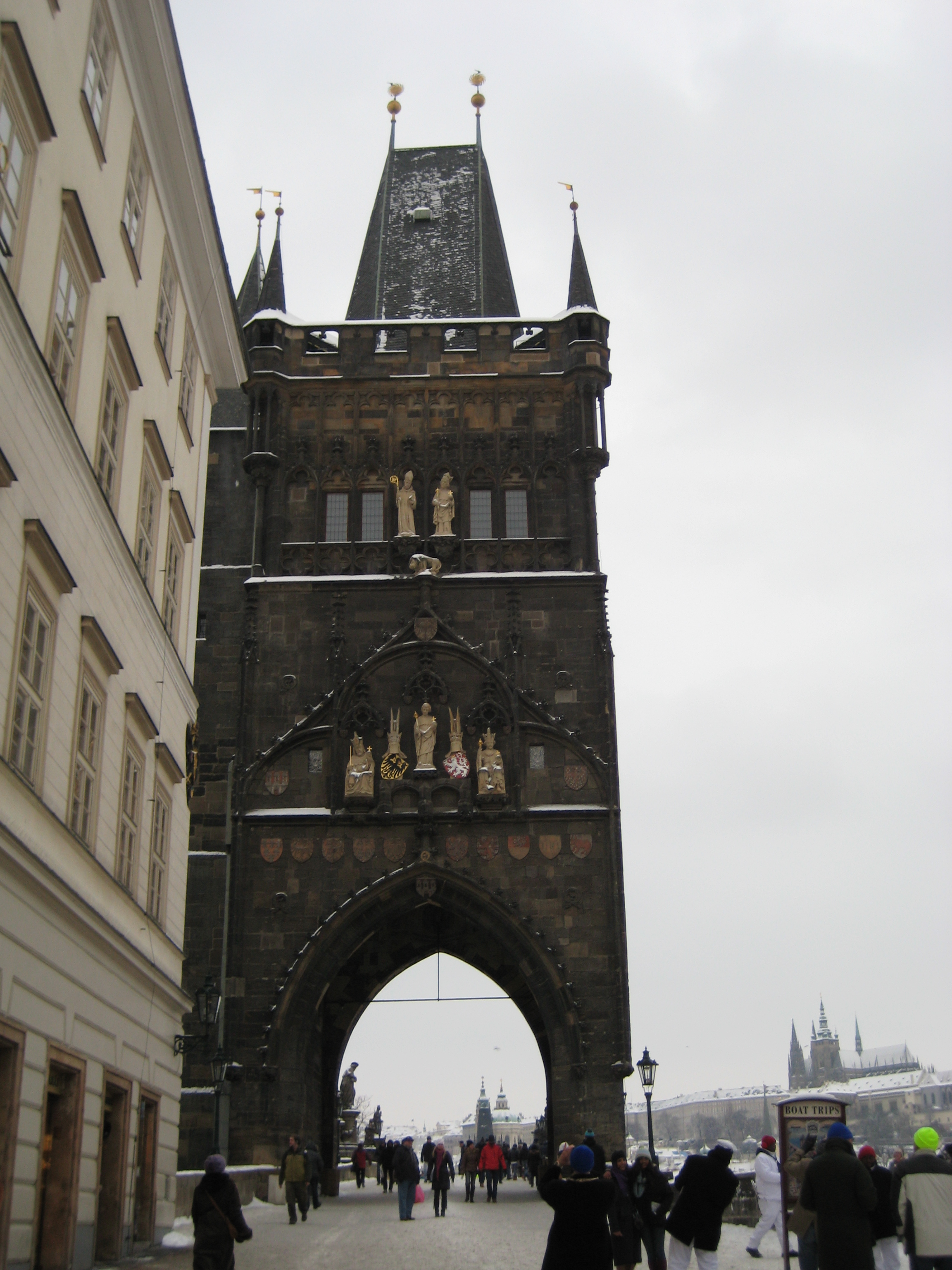 Torre sul ponte Carlo di Praga